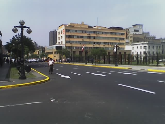 Jirón Lampa y local del Jurado Nacional de Elecciones en Lima, Perú